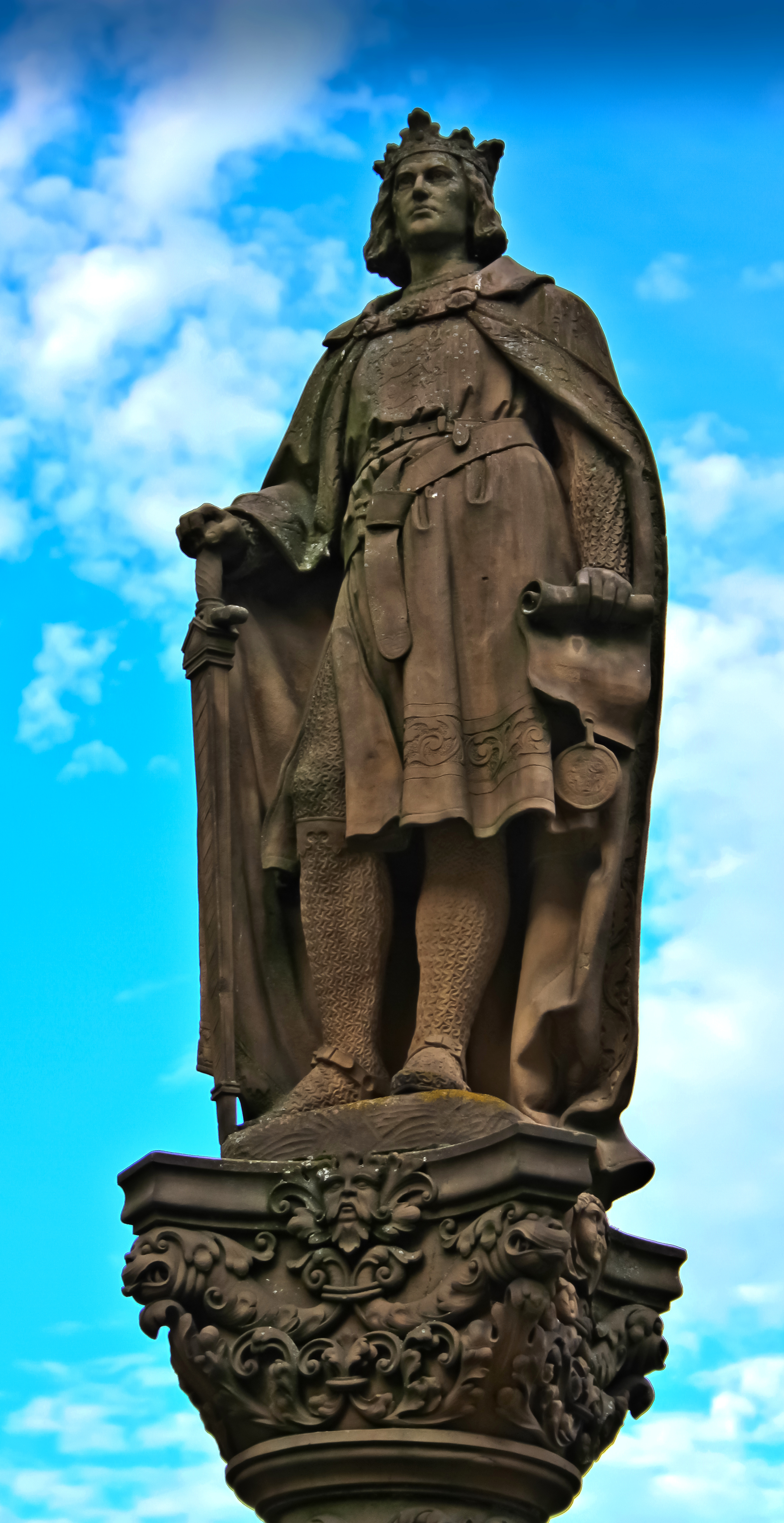 Reutlingen neben der Marienkirche: Statue des Kaisers Friedrich II. auf dem Kirchbrunnen. Erbauer Hans Motz anno 1561.